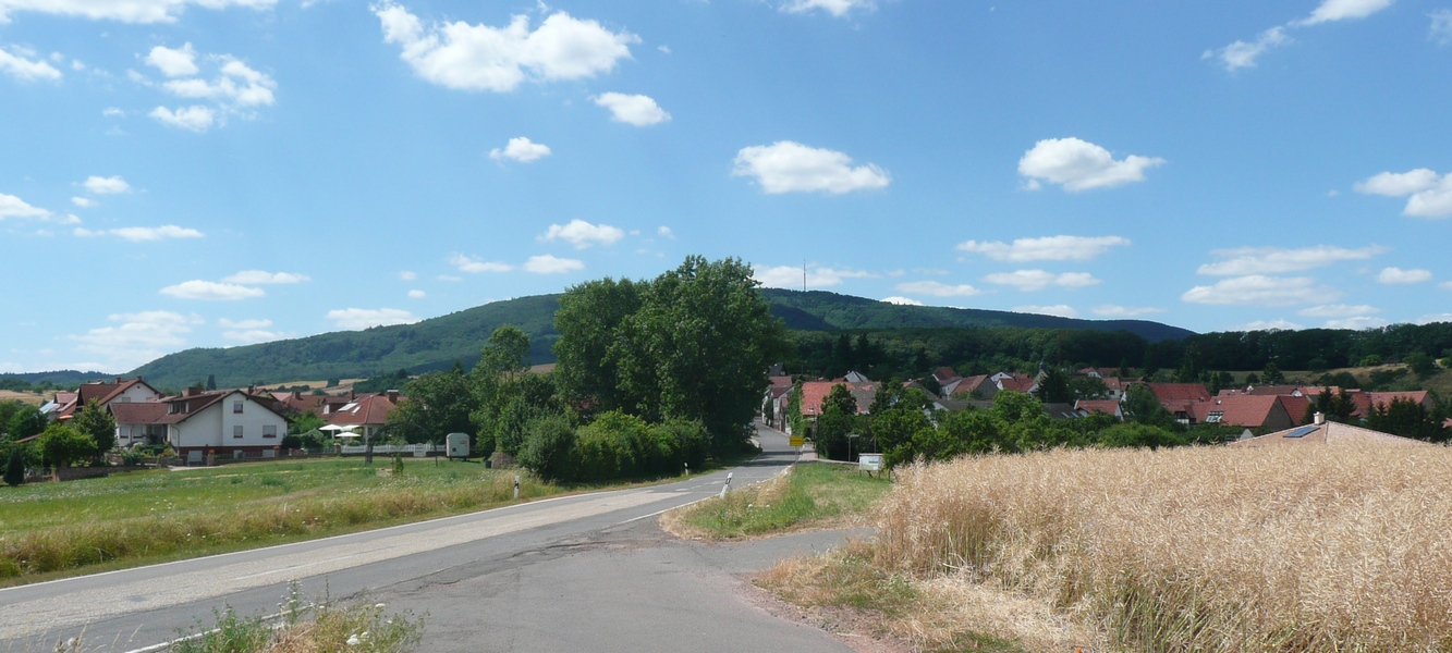 Ansicht von Osten, im Hintergrund Donnersberg